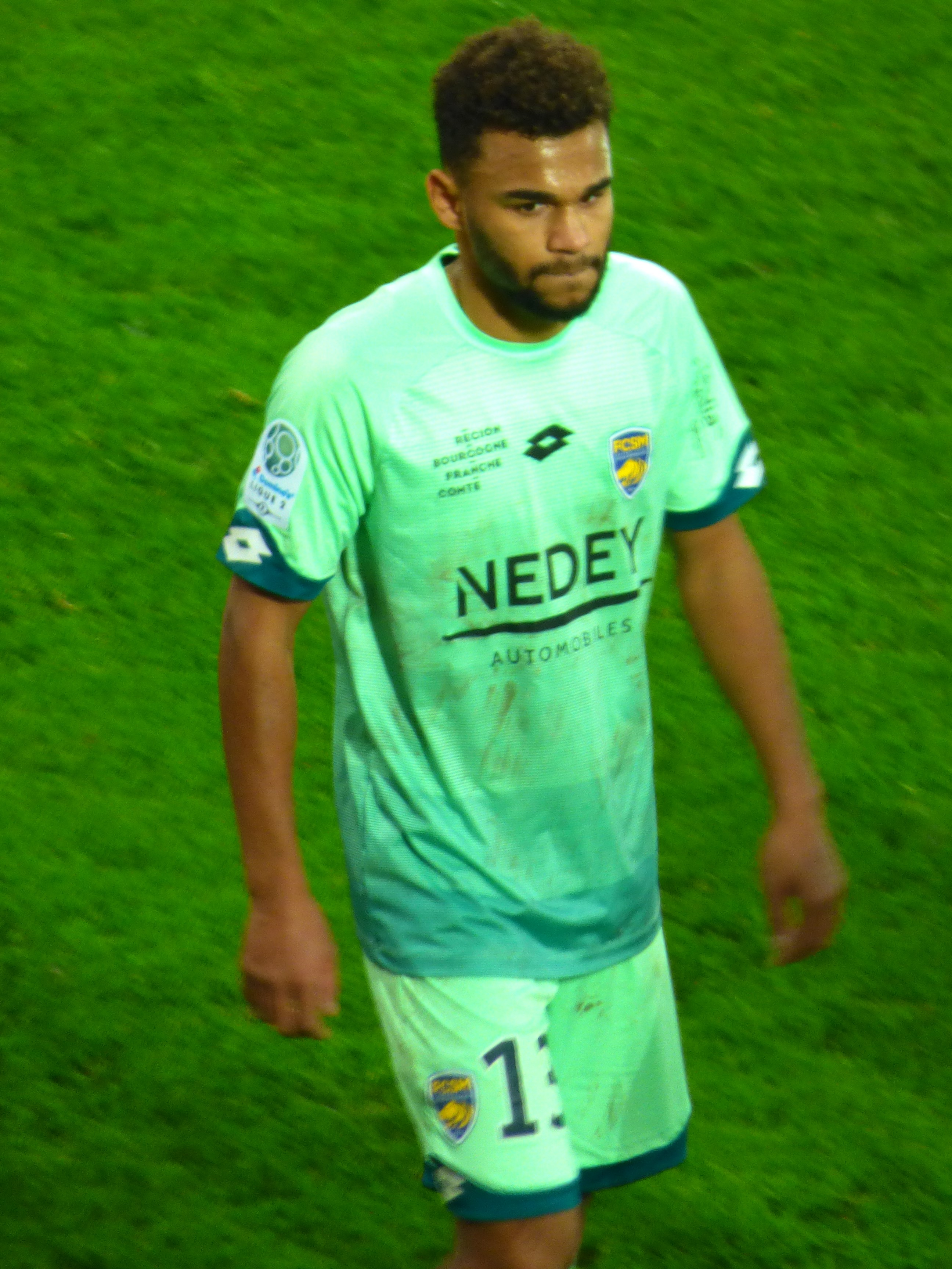 Christopher Rocchia après le match RC Lens / FC Sochaux, comptant pour la quinzième journée du championnat de France de Ligue 2 de football 2019-2020, le 23 novembre 2019, au Stade Bollaert-Delelis.